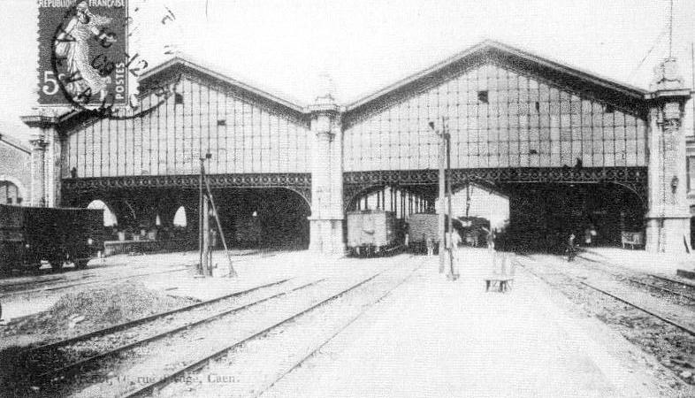 Anciennes halles de la gare de Caen (détruites lors de la rénovation de la gare dans les années 1930)